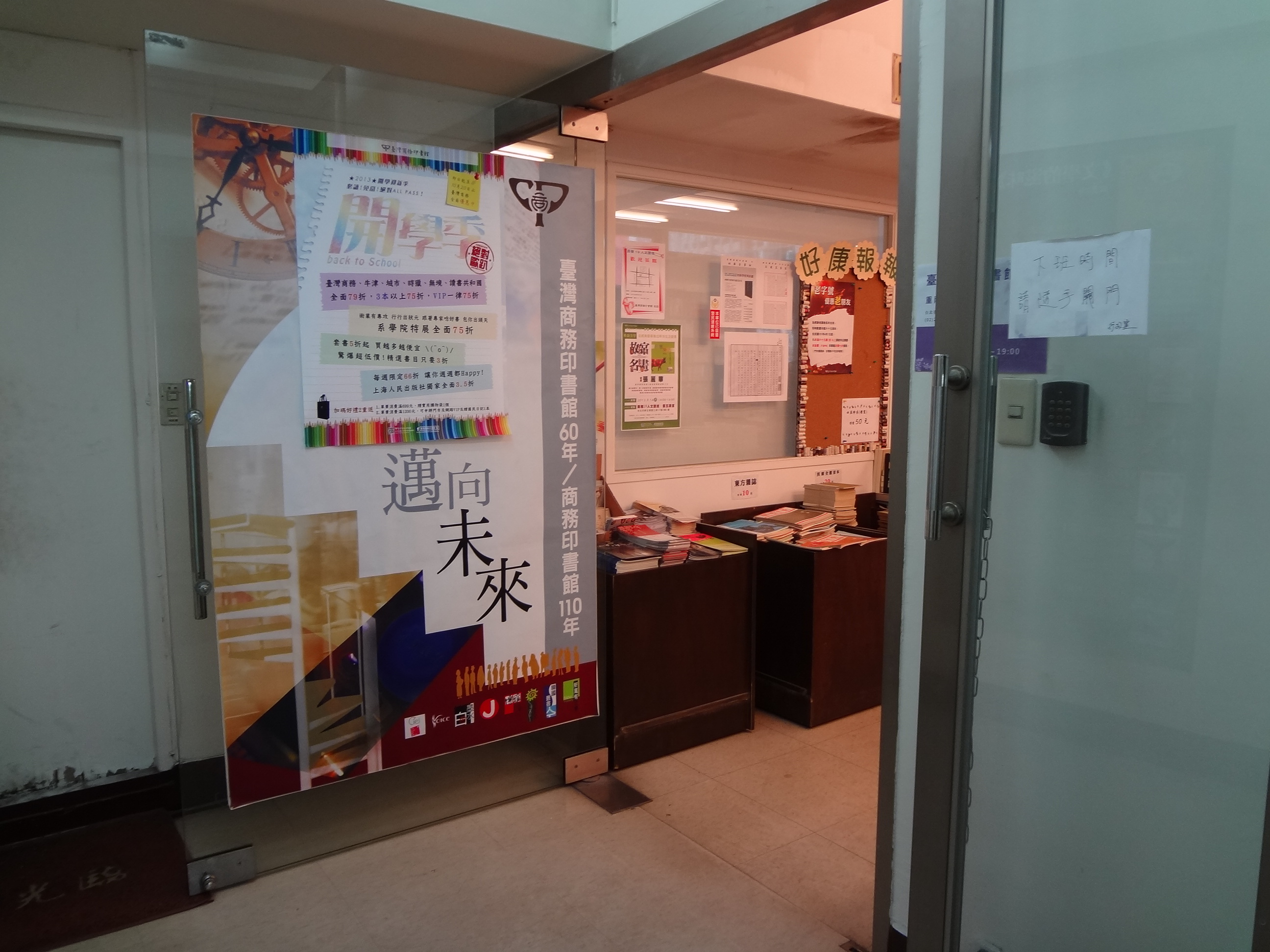 臺灣商務印書館重南門市，地址：臺北市中正區重慶南路一段37號2樓（雲五大樓）。